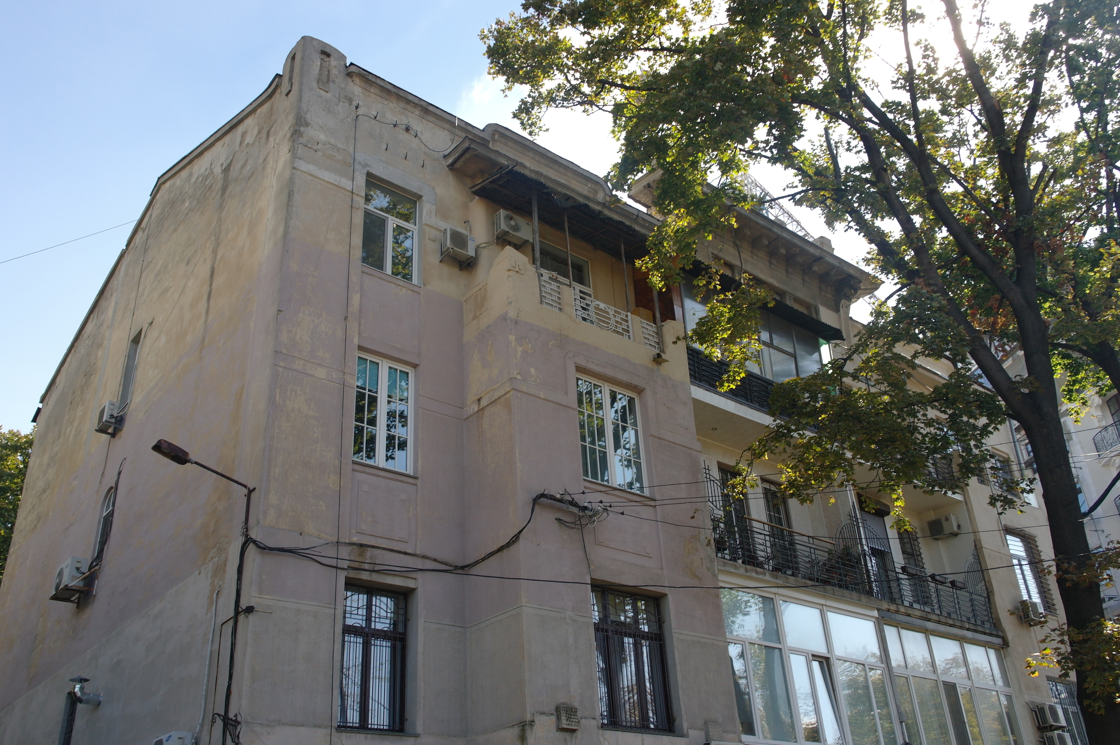 Одеса, Французький бульвар, 11a